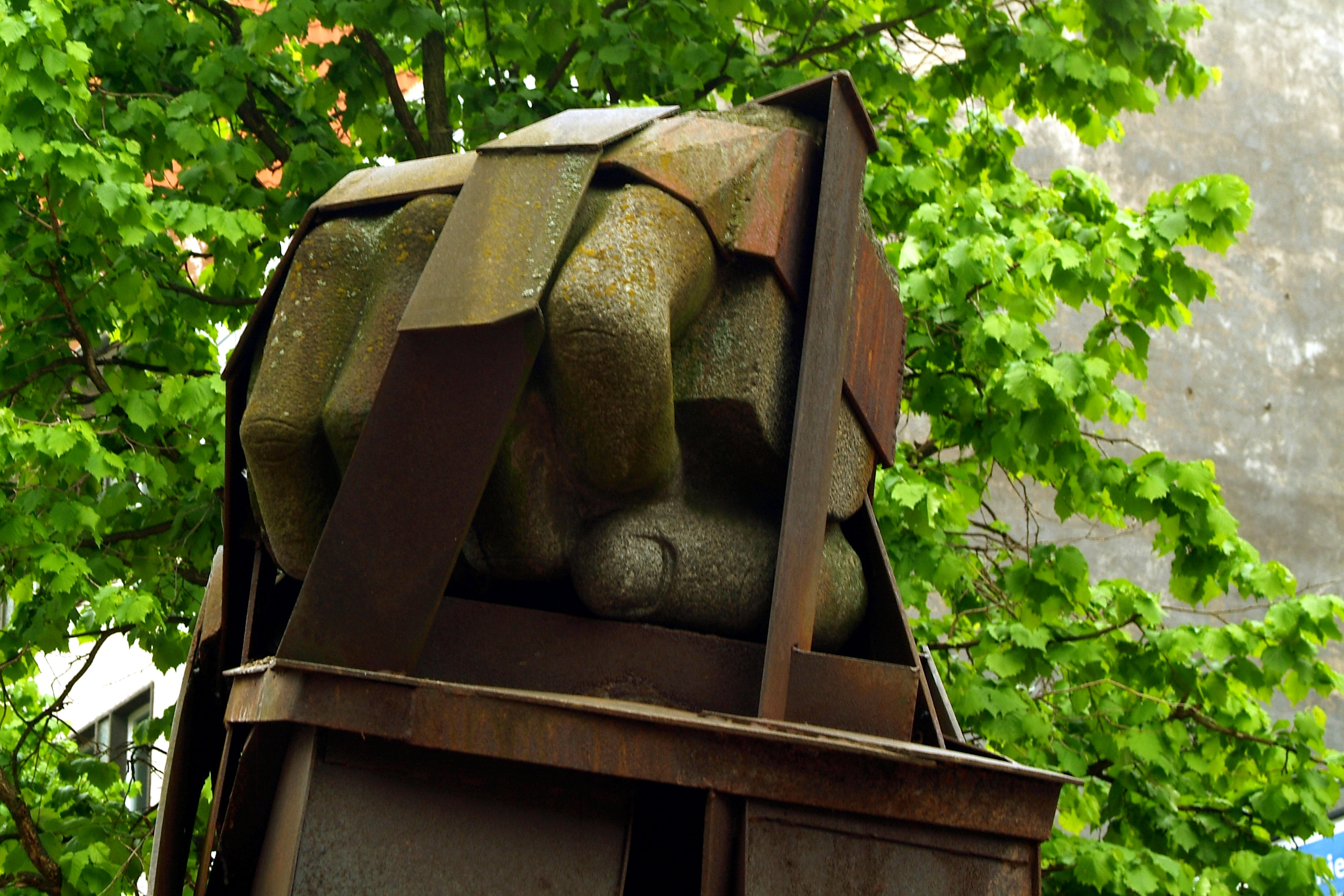 Die "Gefangene Granitfaust", Teil der Skulptur Bogside 69 von Hans-Jürgen Breuste ist ein Fundstück aus einem Steinbruch, in dem während des Nationalsozialismus der Bildhauer Arno Breker und seine Schüler für ihre ideologischen Großskulpturen arbeiteten.